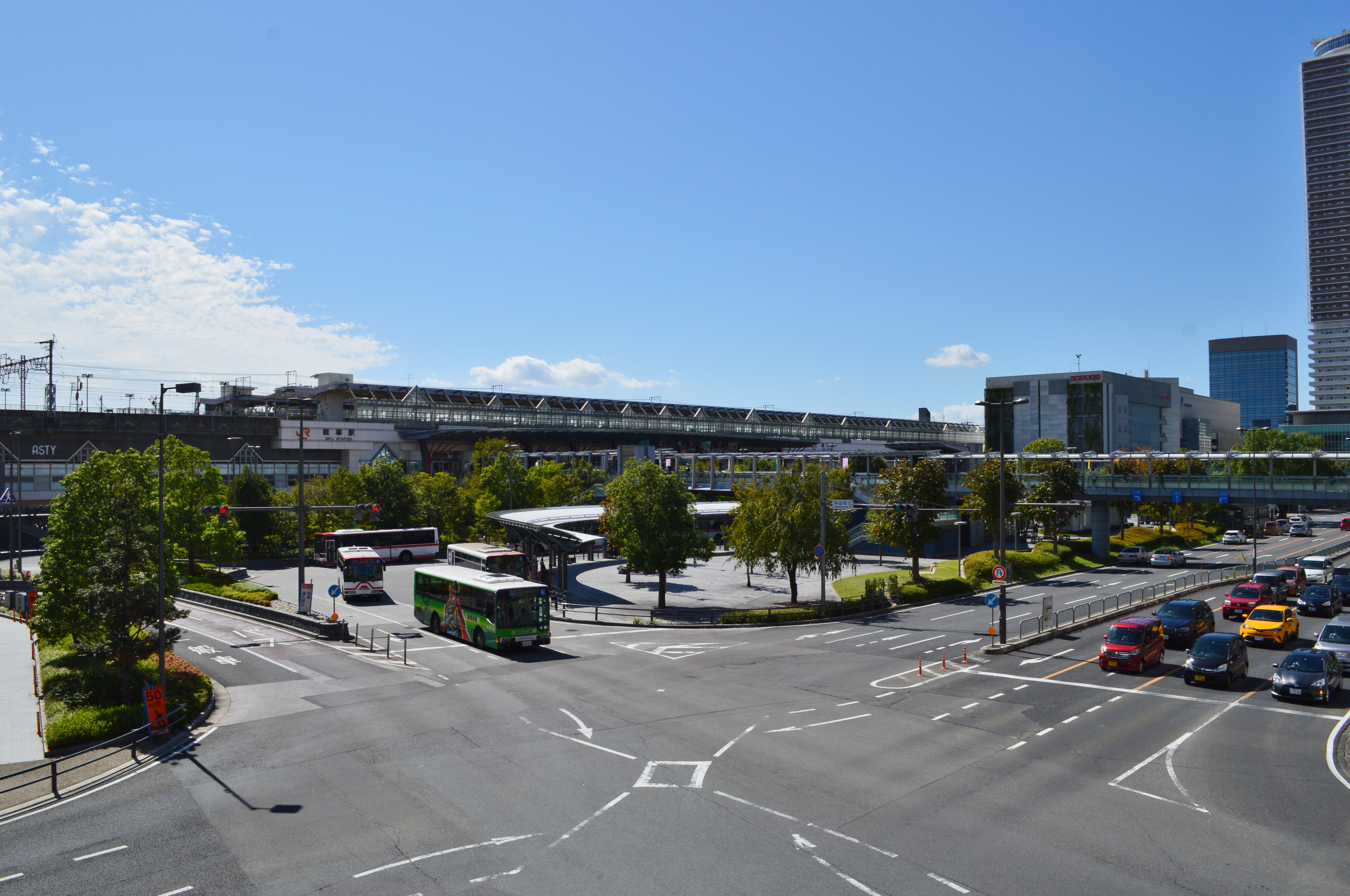 岐阜駅 駅舎